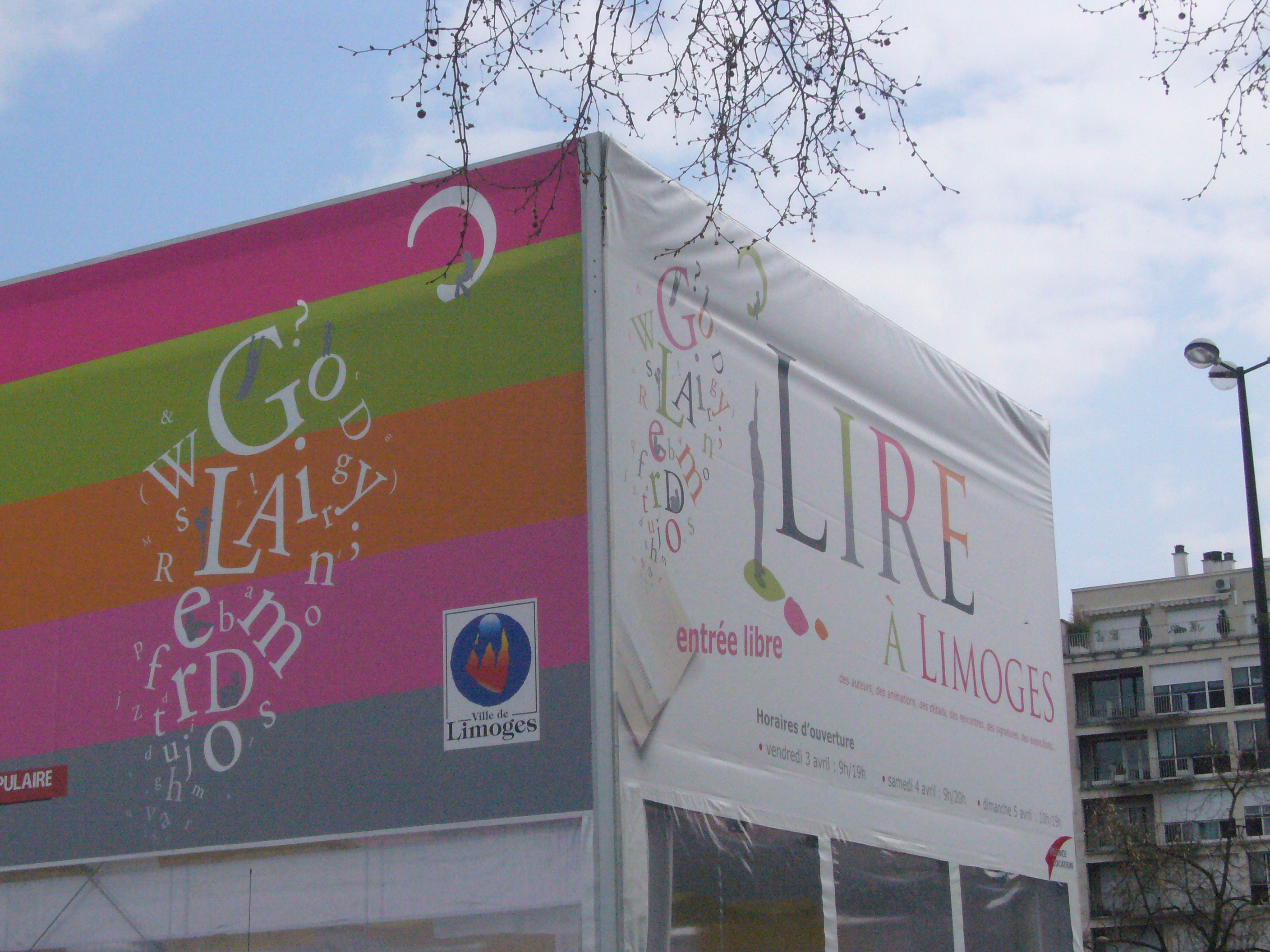 Entrée du chapiteau du festival Lire à Limoges 2009 (Limoges, France)